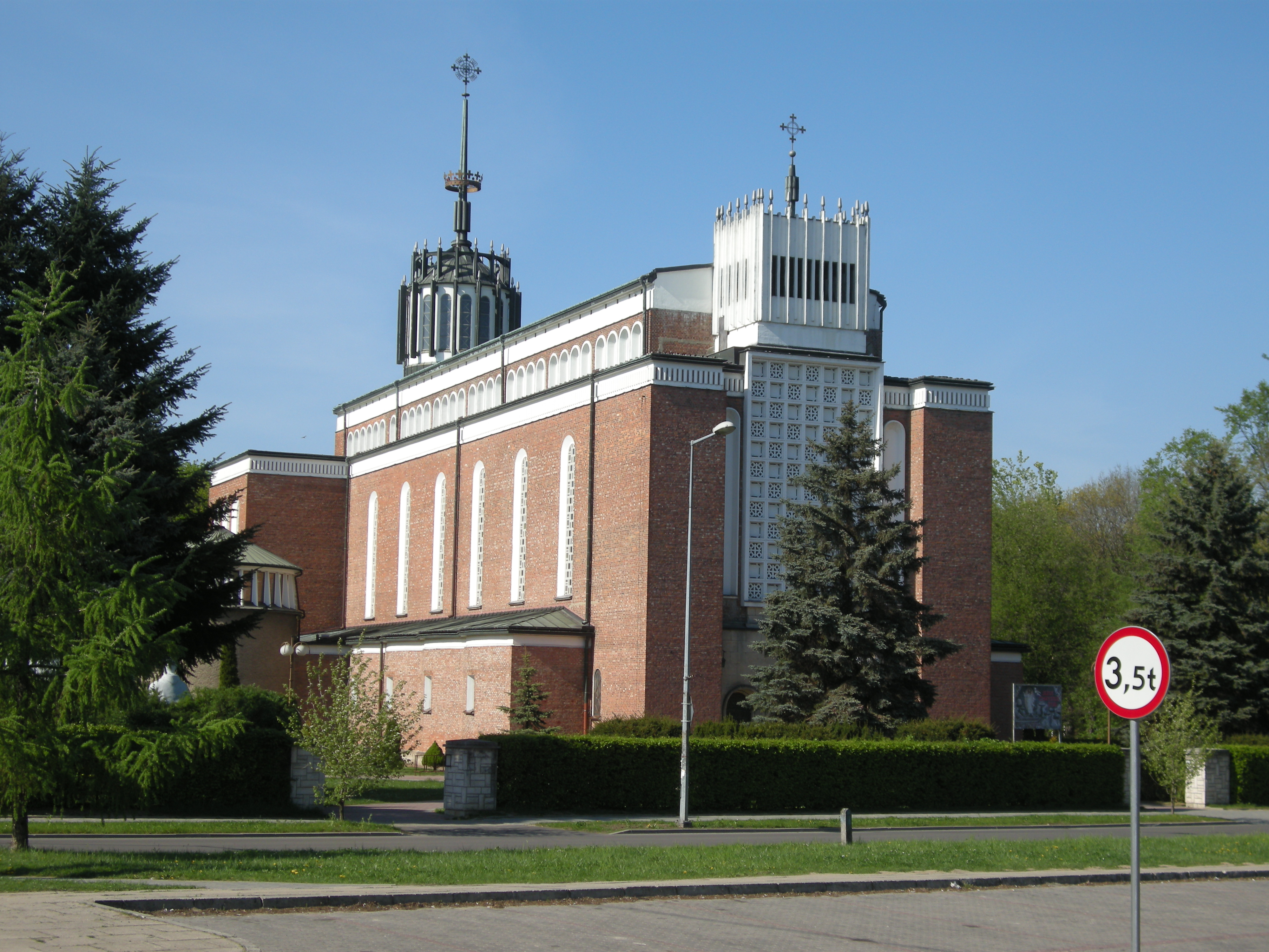 Kościół parafii Najświętszej Maryi Panny Królowej Polski w Tarnowie- Mościcach l. 1948-1956.